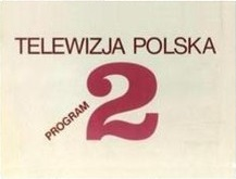 logo TVP2 z lat 1973-1976